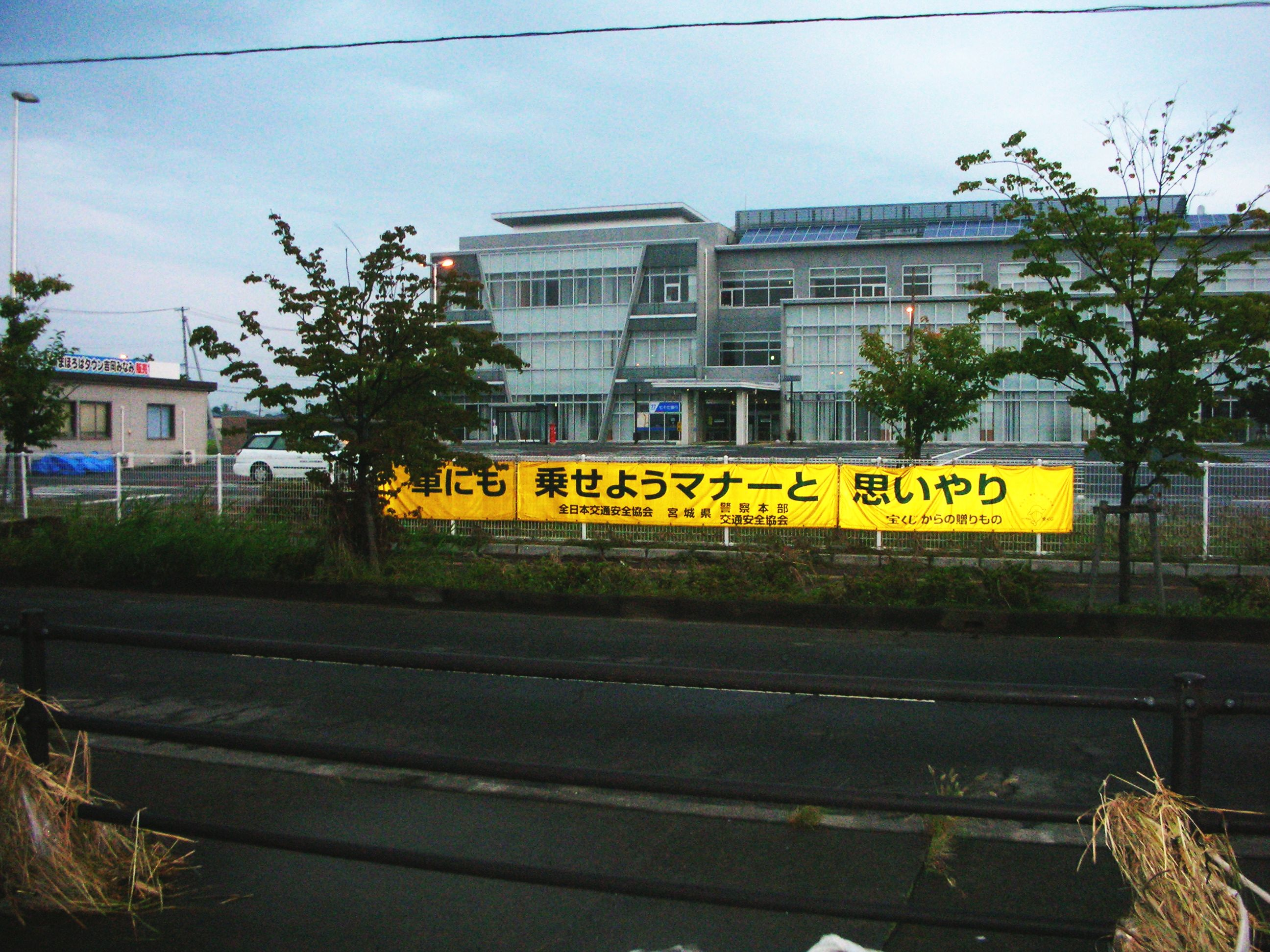 洪水が去った後の大和町役場前